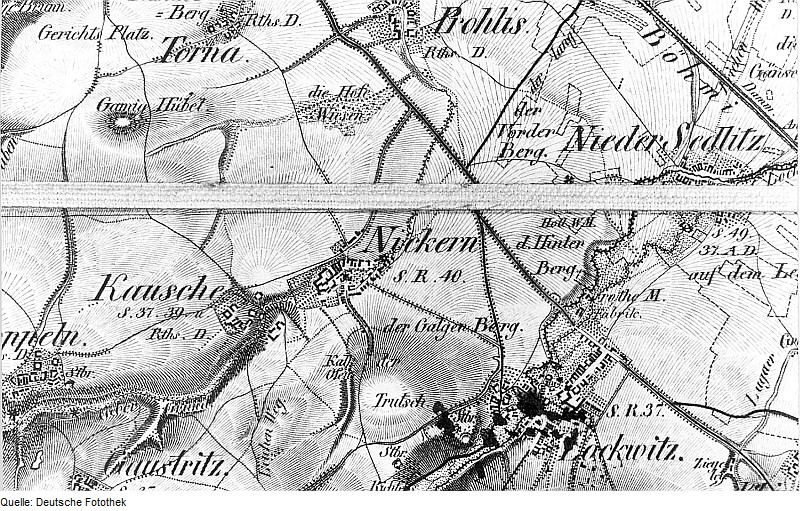 Original image description from the Deutsche Fotothek Dresden-Nickern. Oberreit, Sect. Dresden, 1821/22